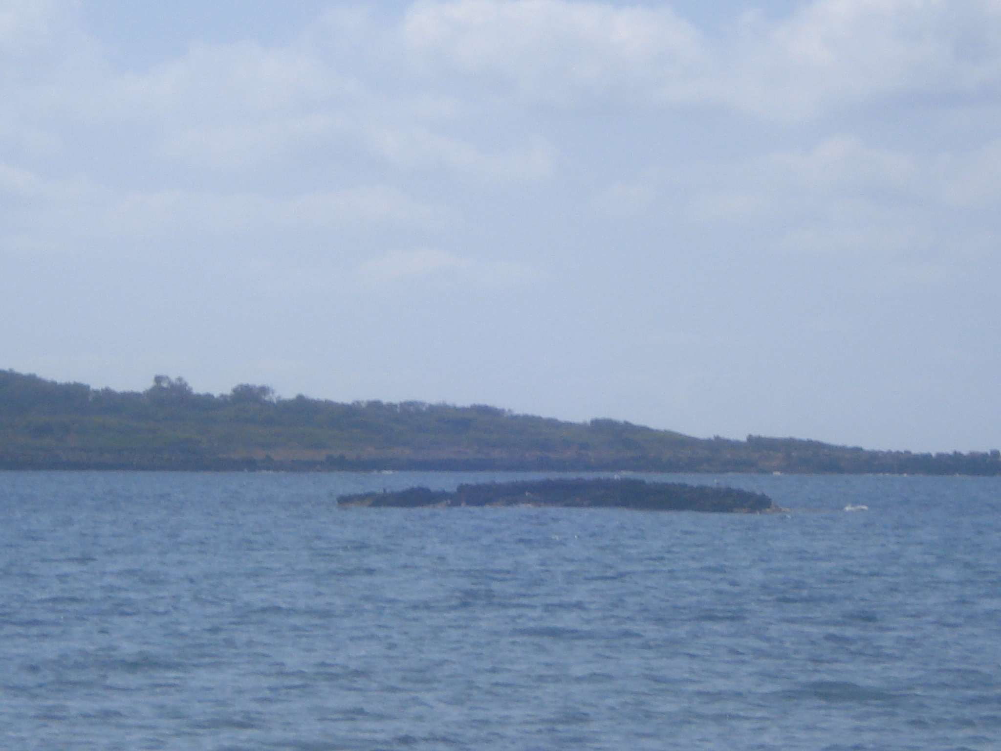 Illot petit de na Moltona vist des de Na Moltona